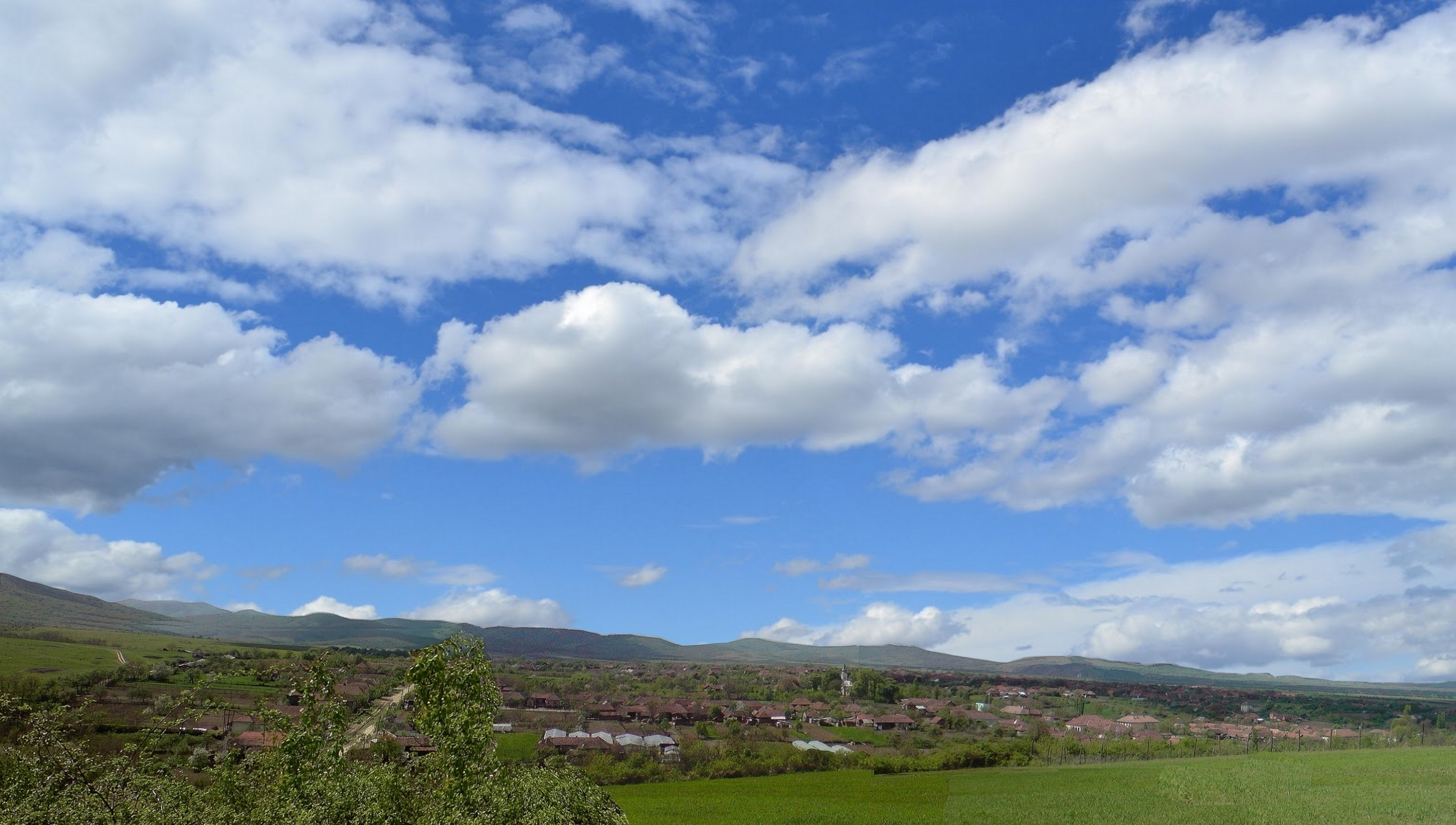 DRAUŢ 2009.